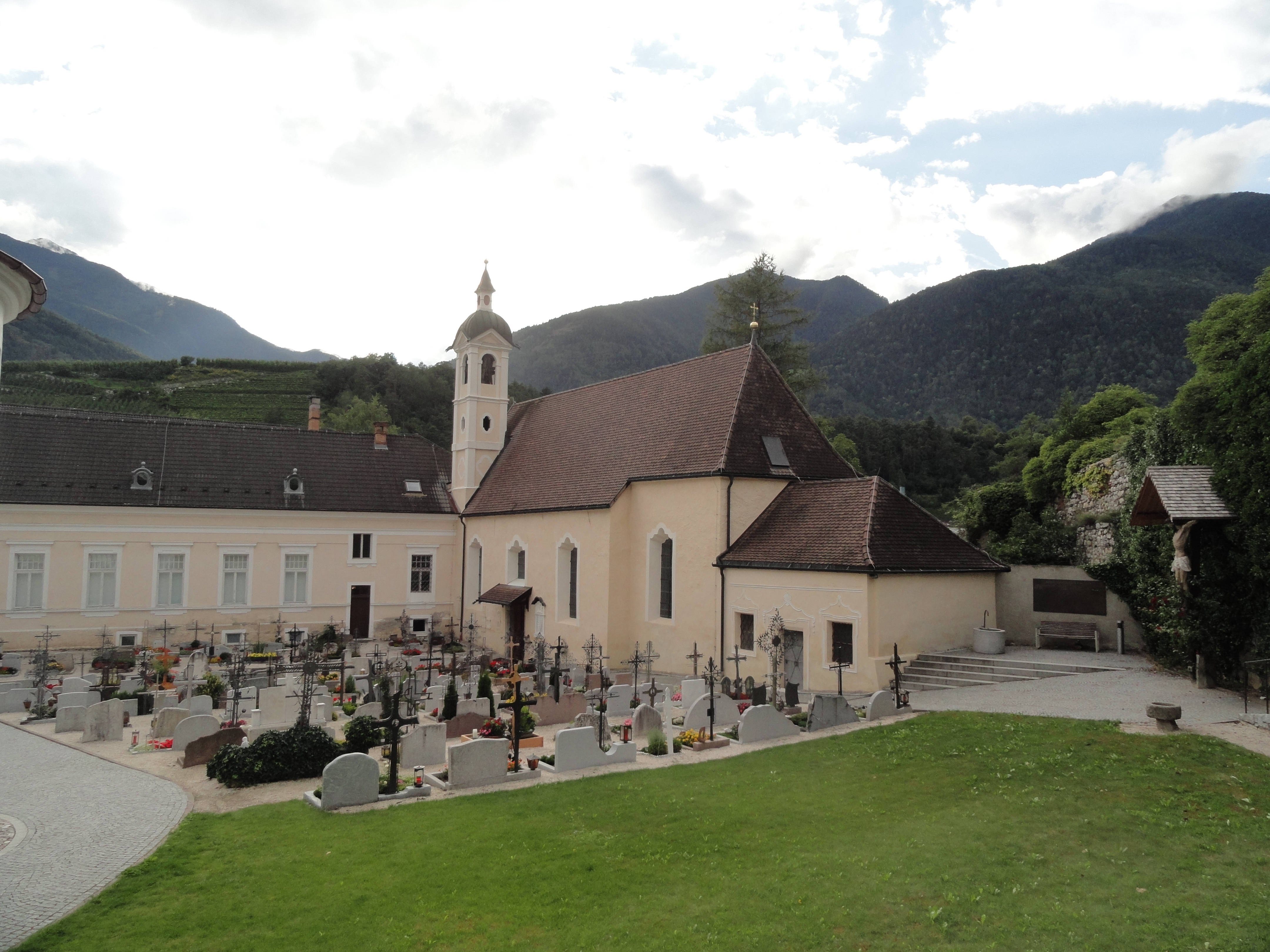 Pfarrkirche St. Margarethen in Neustift (Außenperspektive)